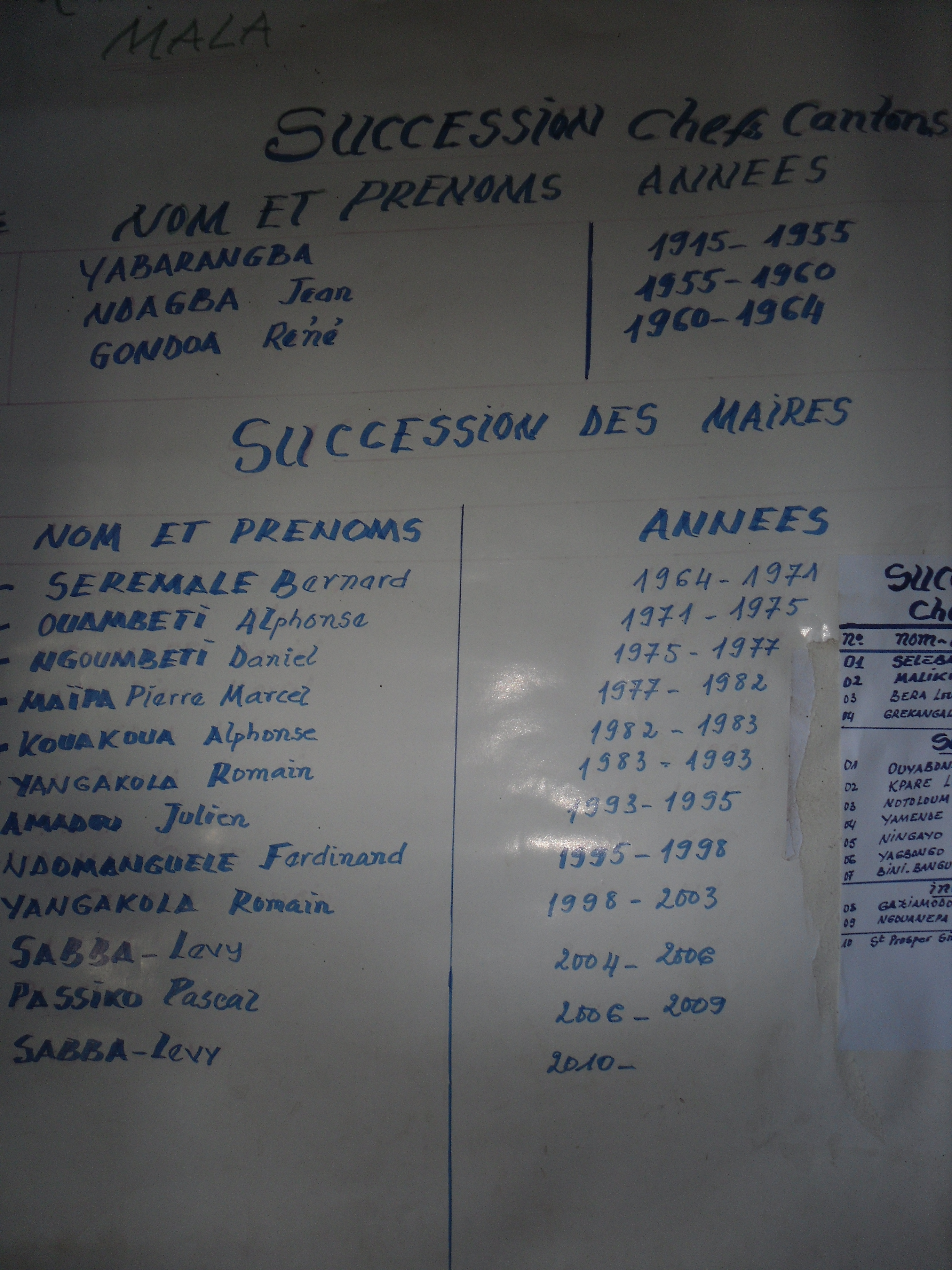 La liste des Chefs de Canton de Yabarangba et des Maires de Mala depuis l'indépendance